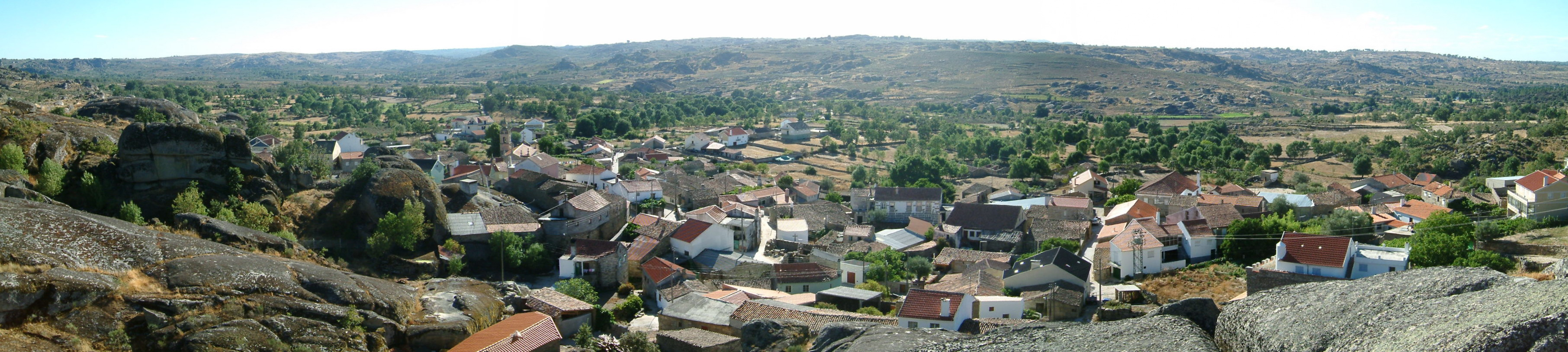 Cabreira